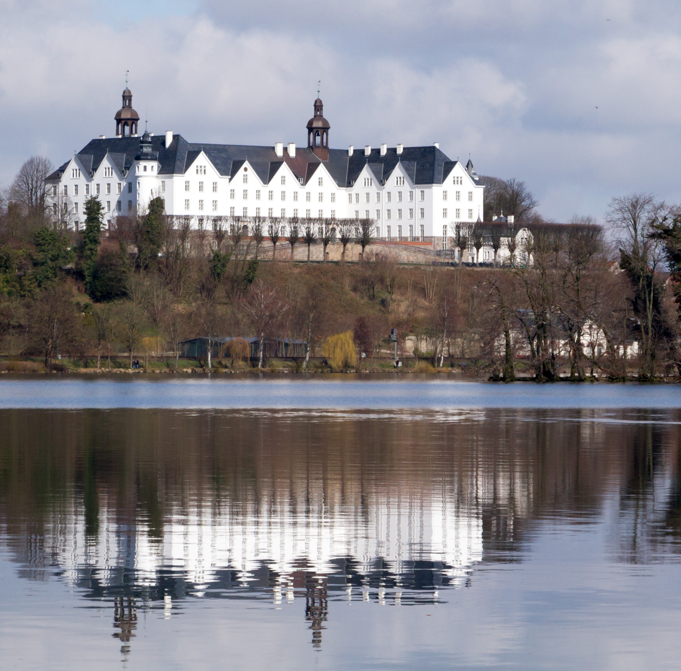 Schloss Plön